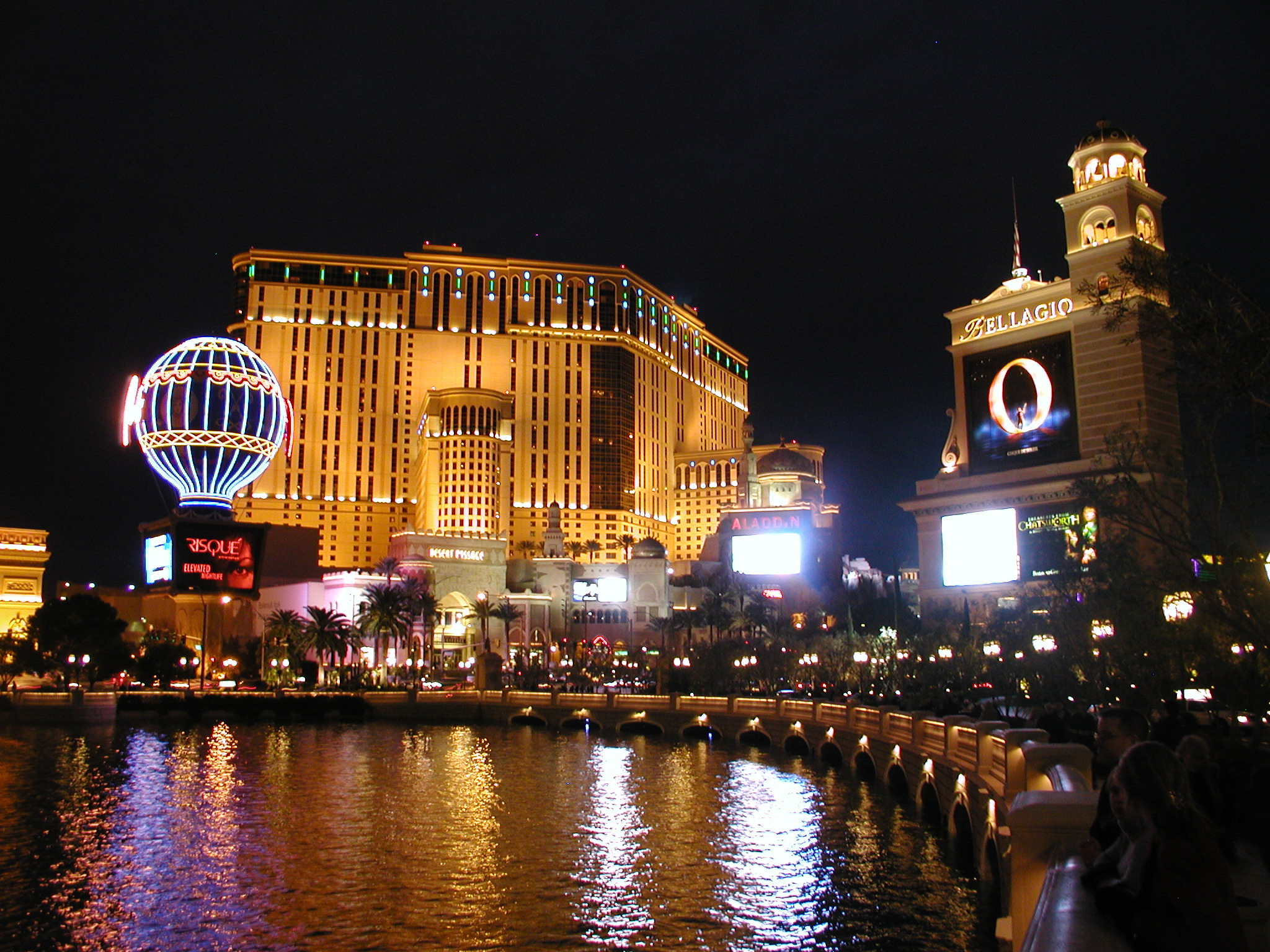 A Las Vegas Boulevard, mais conhecida como "STRIP". Nesta avenida ficam localizados os maiores cassinos da cidade.